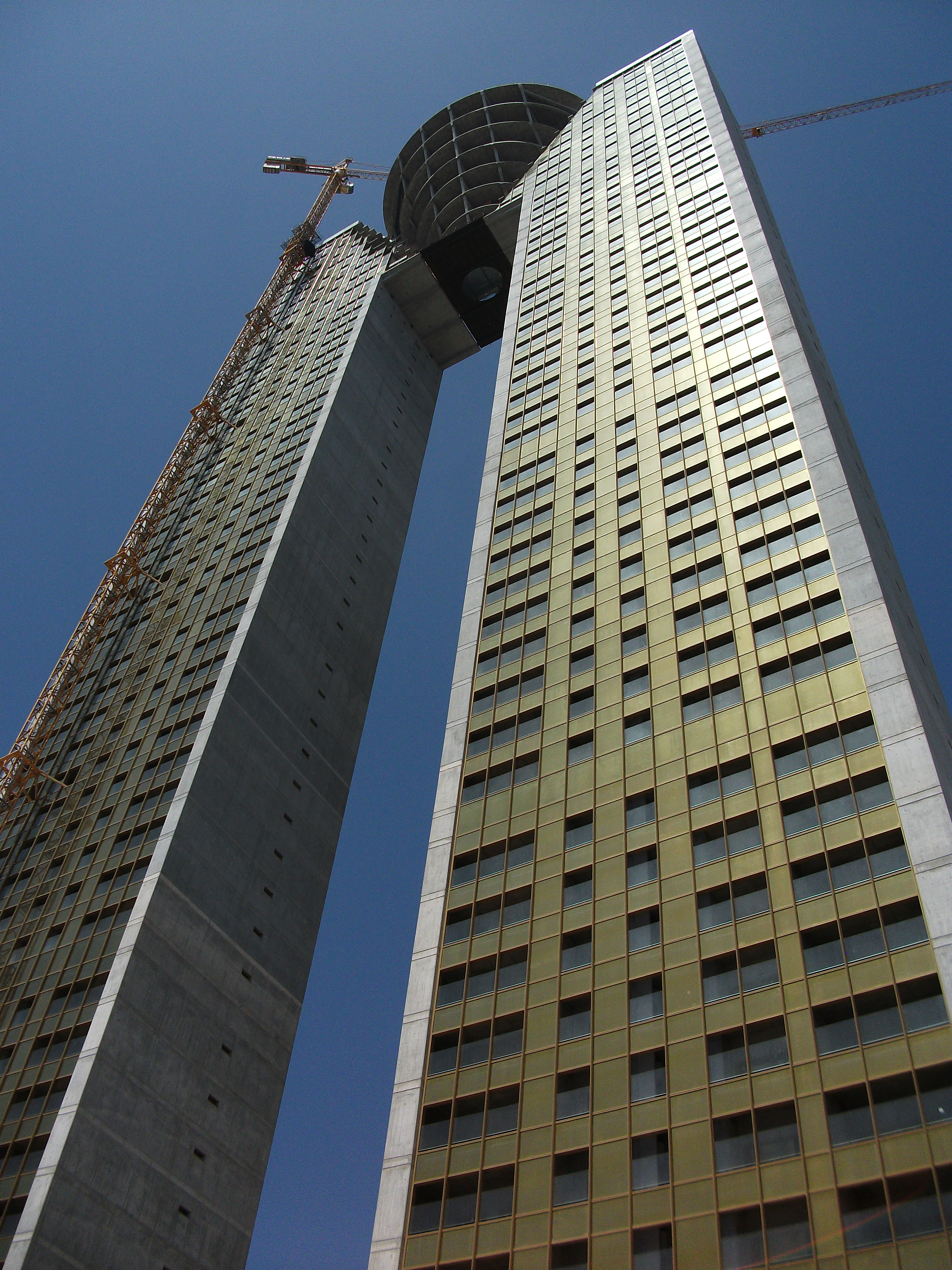 Edificio In Tempo, Benidorm, Alicante (España)